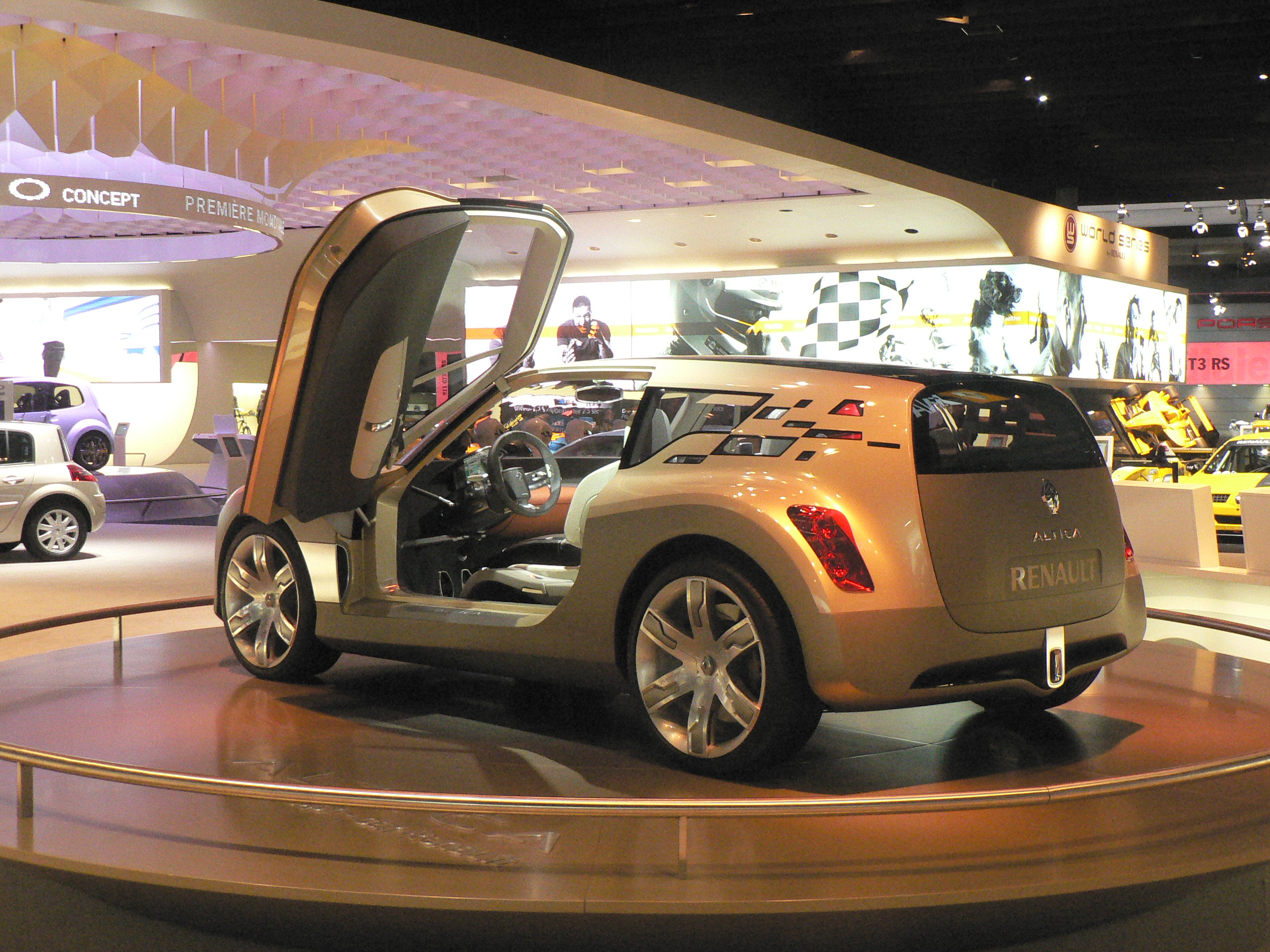 Mondial de l automobile de Paris (October 2006)